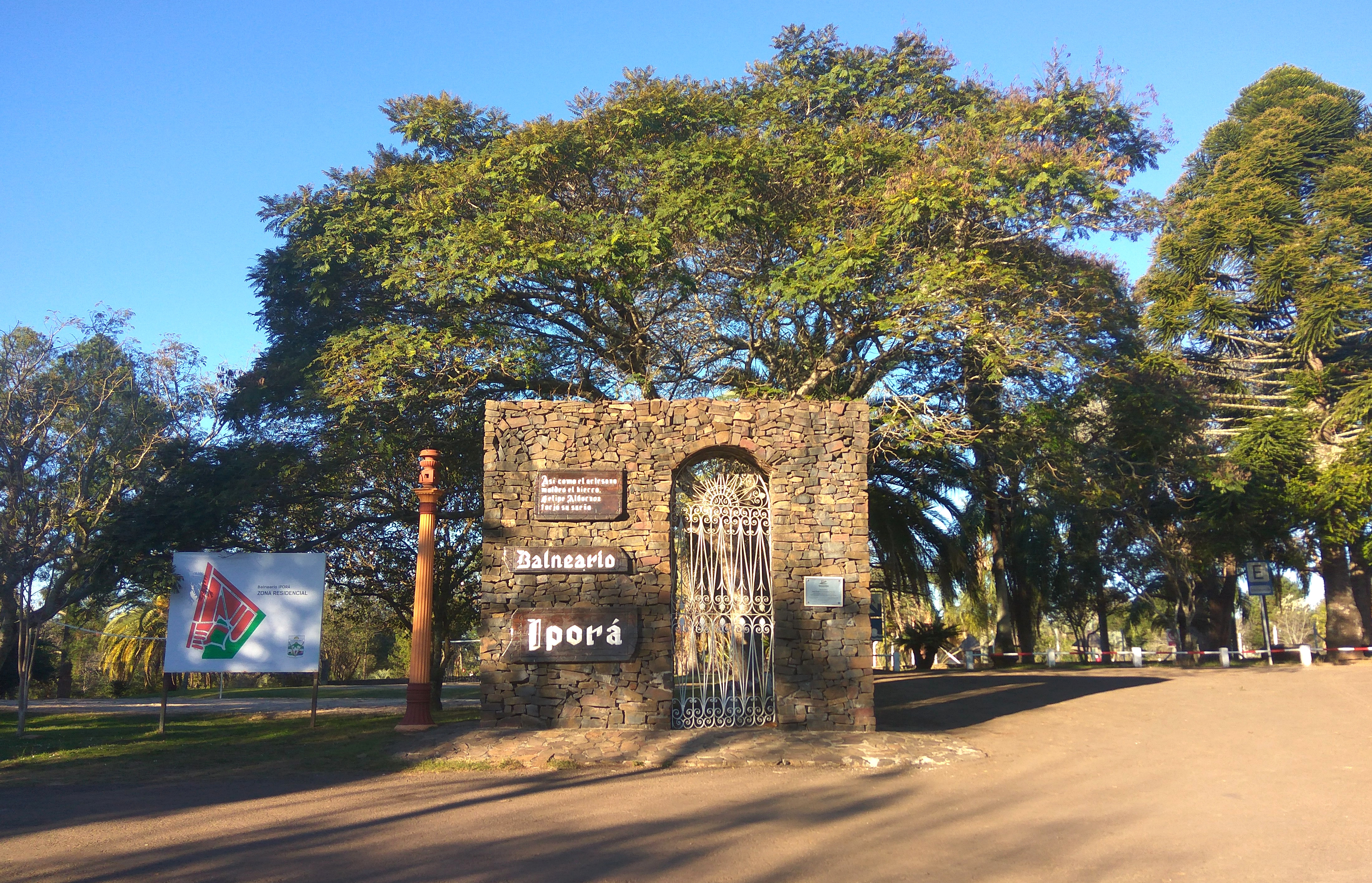 Entrada simbólica al Balneario Iporá. Departamento de Tacuarembó, Uruguay. El cartel dice: "Así como el artesano moldeó el hierro, Felipe Albornoz forjó su sueño". Albornoz fue un empresario que impulsó la construcción y venta de terrenos del balneario Iporá.